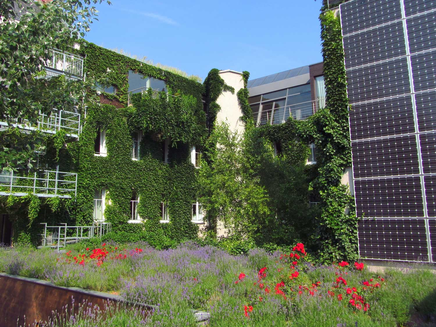 Das Hotel mit Lavendeldach und Photovoltaik Anlage